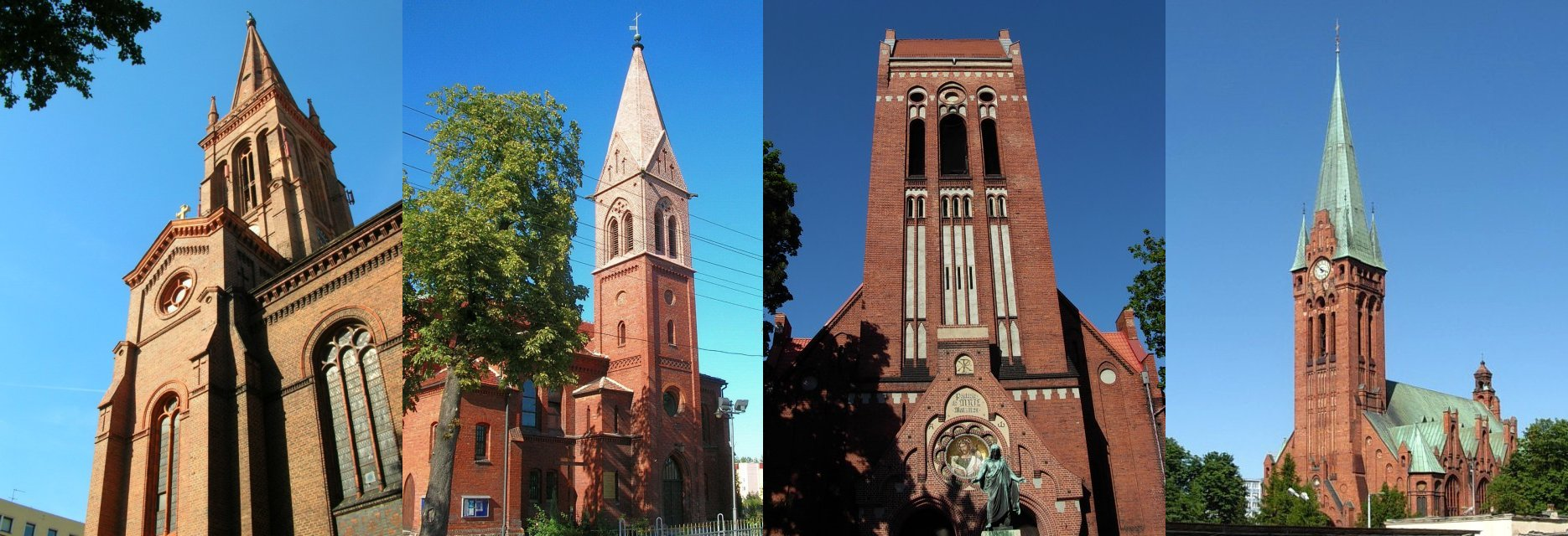 Kościoły bydgoskie: św. Piotra i Pawła, św. Jana, Chrystusa Zbawiciela, św. Andrzeja Boboli